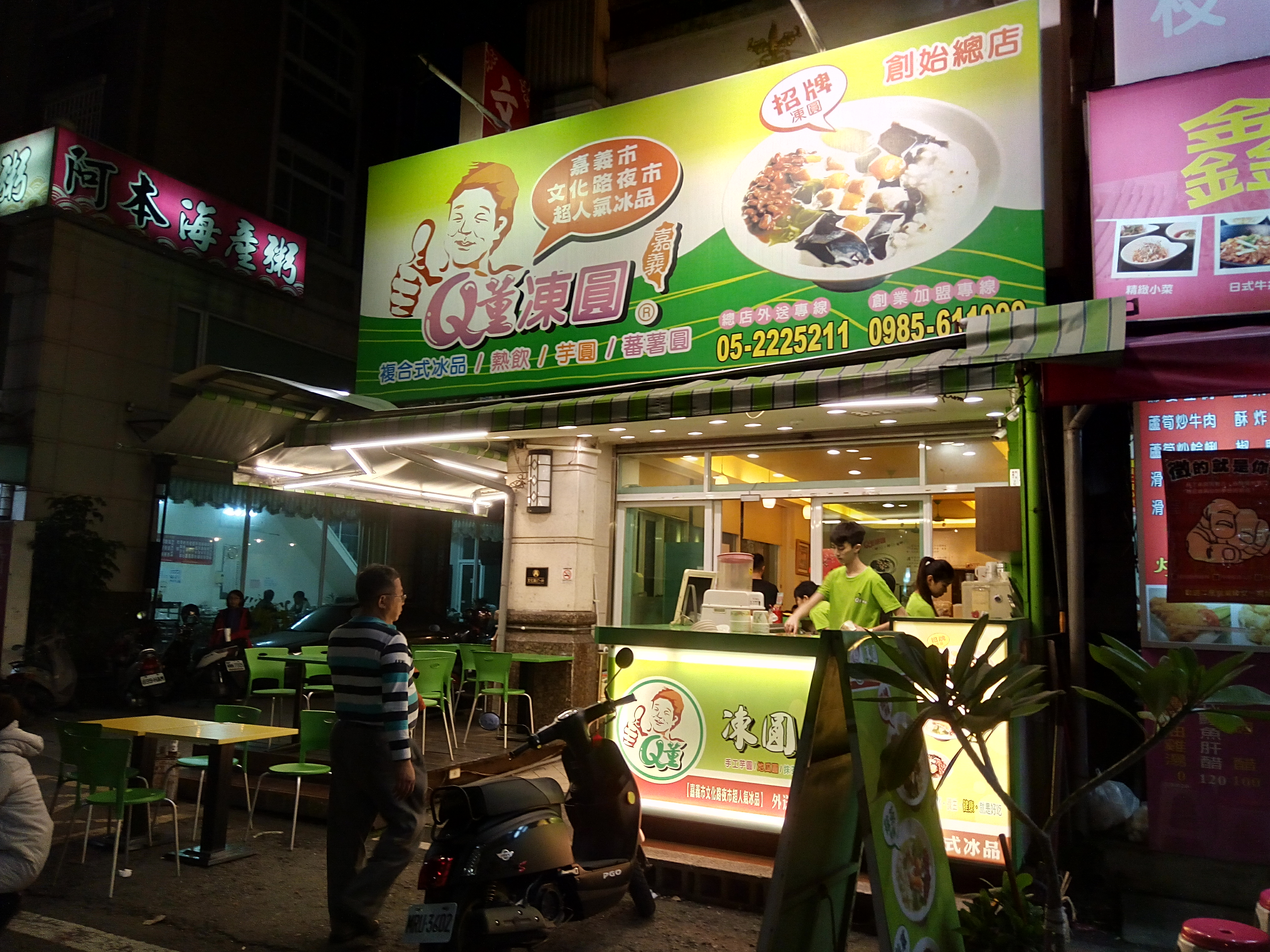 文化路夜市にあるQ董の冷たい芋圓スープ本店